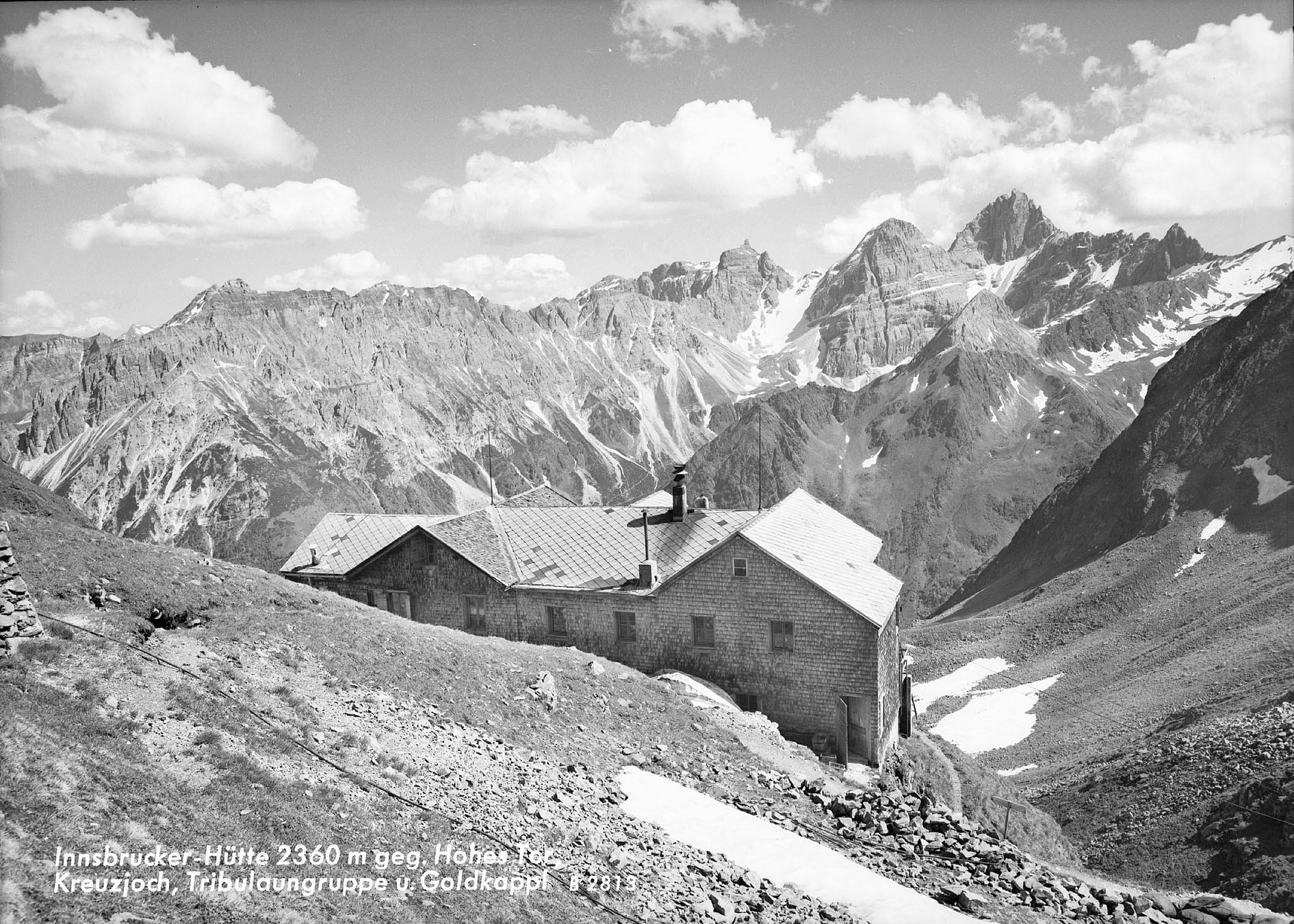 Innsbrucker Hütte 2360 m gegen Hohes Tor - Kreuzjoch Tribulaungruppe und Goldkappl